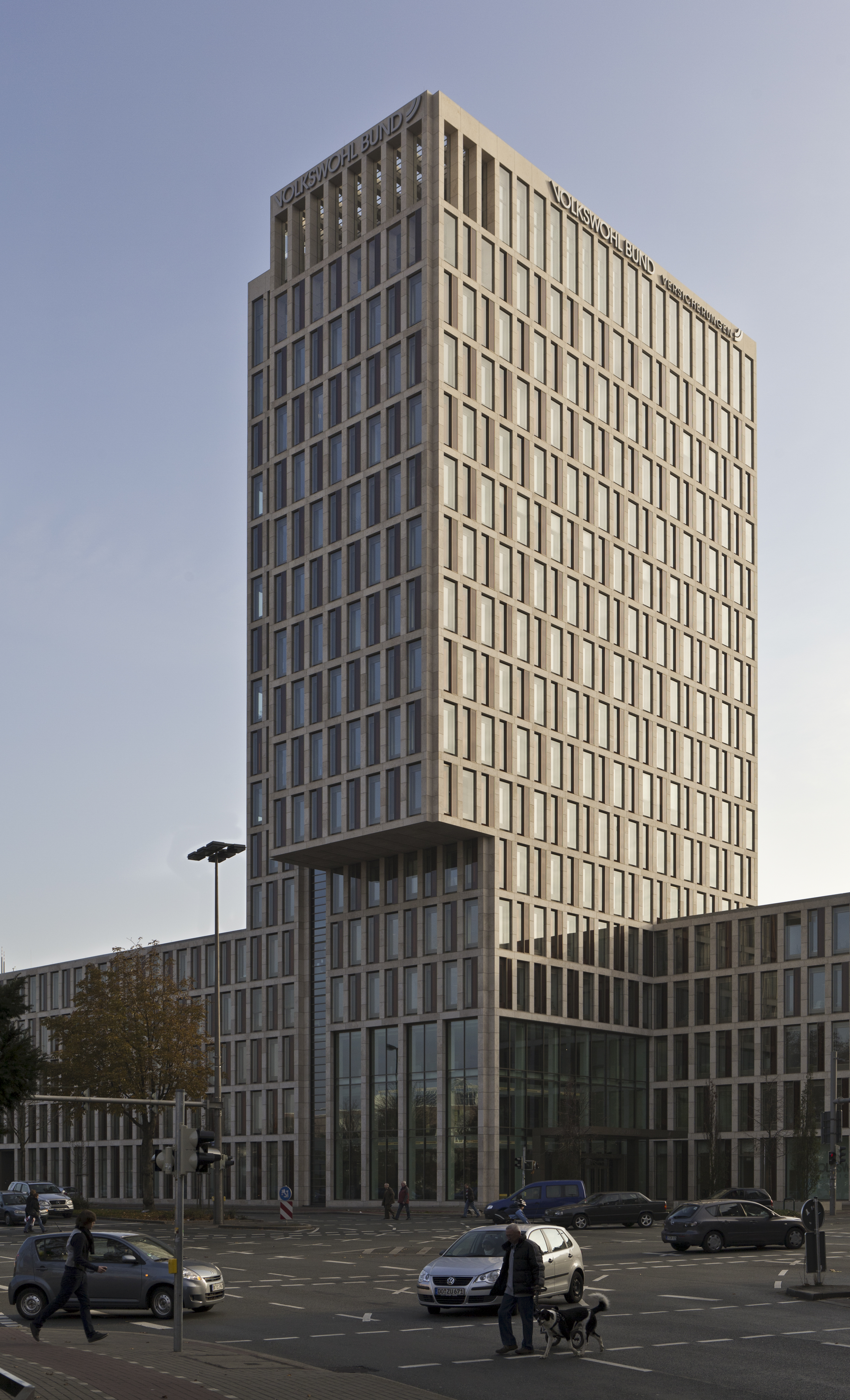 Dortmund, Innenstadt, neues Hochhaus des Volkswohlbundes